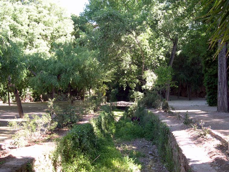 Vivarium (Viver) - detalle de los canales que alimentaban los estanques de cria y engorde de peces en la época romana aprox. 200 a.C., nacimiento del barranco Hurón, La Floresta